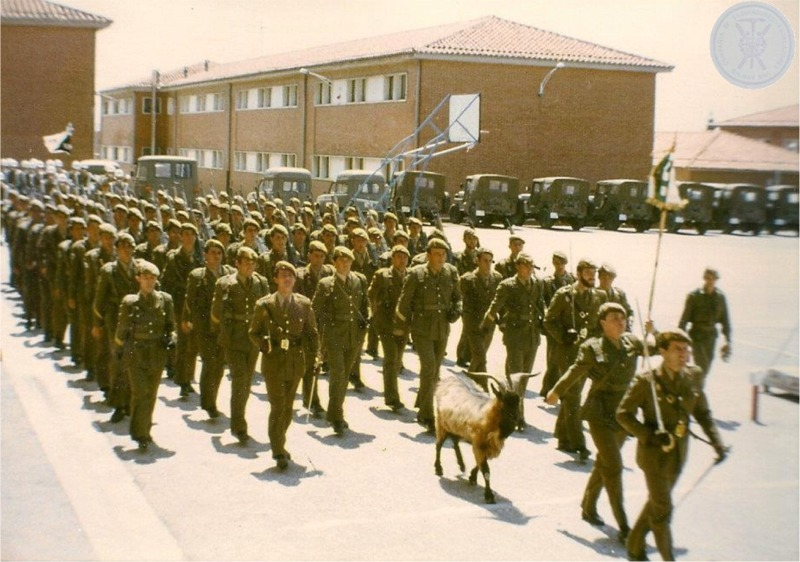 Álbum de fotos de la Compañía de Esquiadores Escaladores de la División de Montaña Navarra.